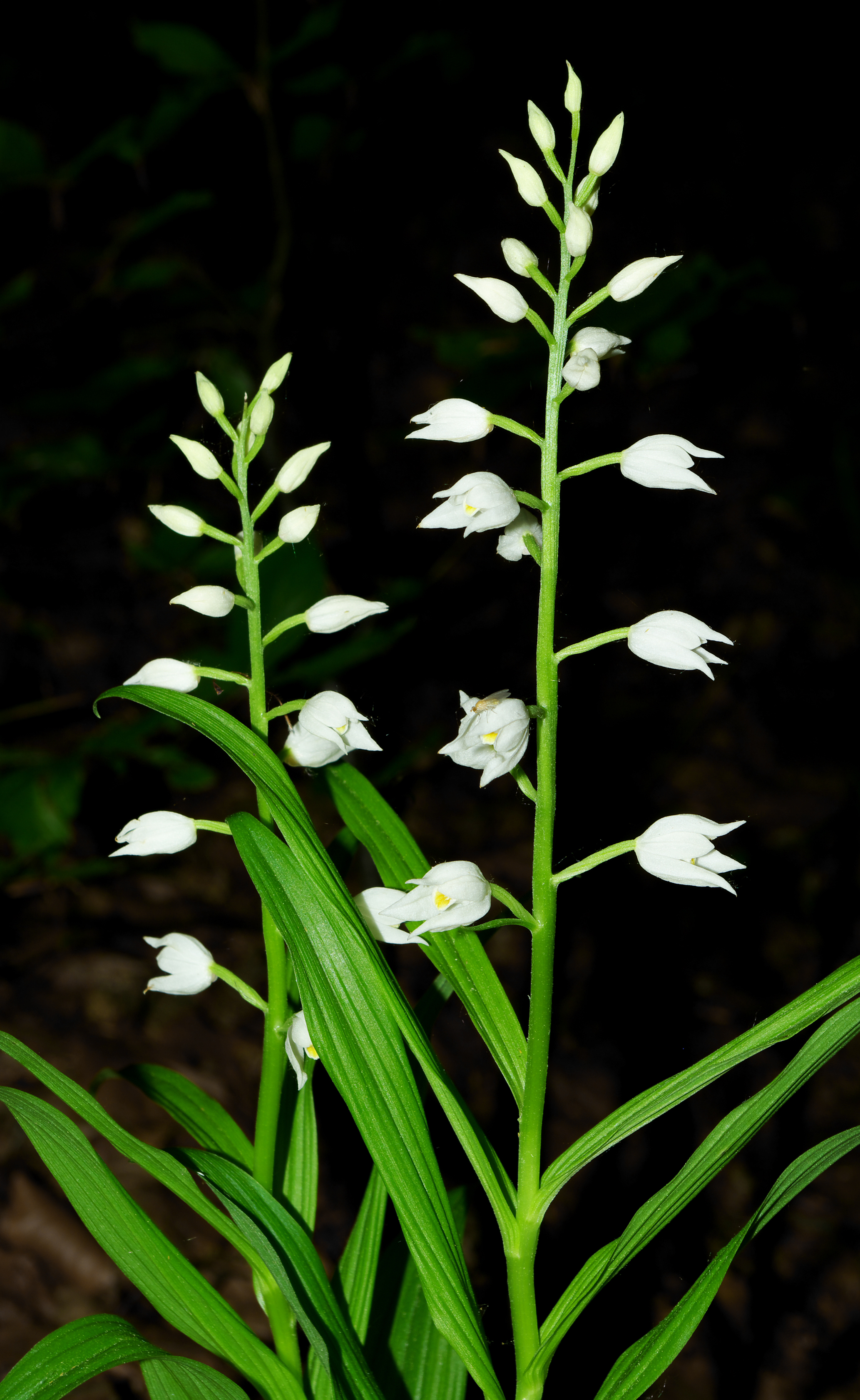 Buławnik mieczolistny (Cephalanthera longifolia) / Bukowa Góra / Dąbrowa Górnicza